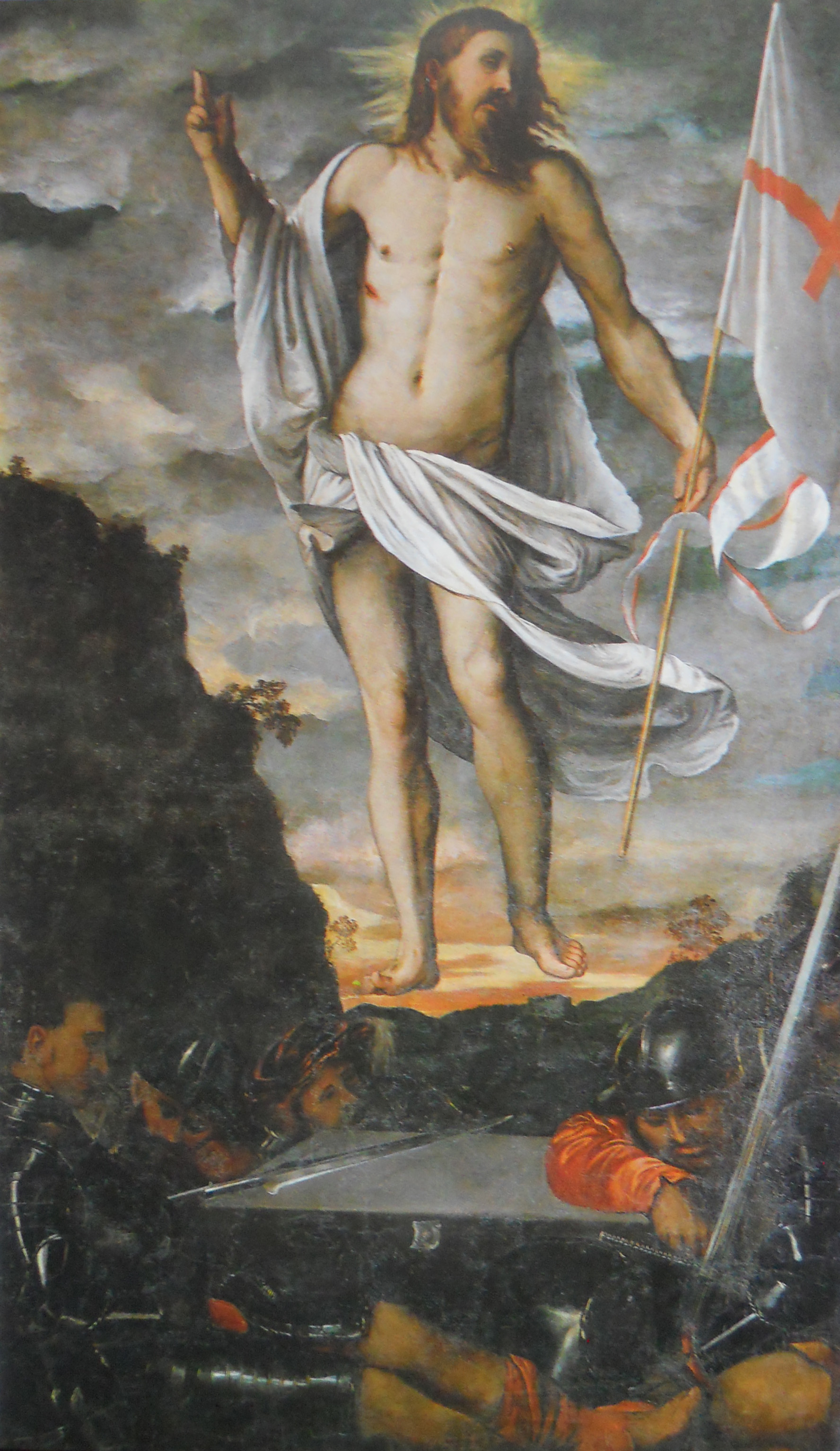 Stendardo processionale del Santissimo Sacramento, lato1